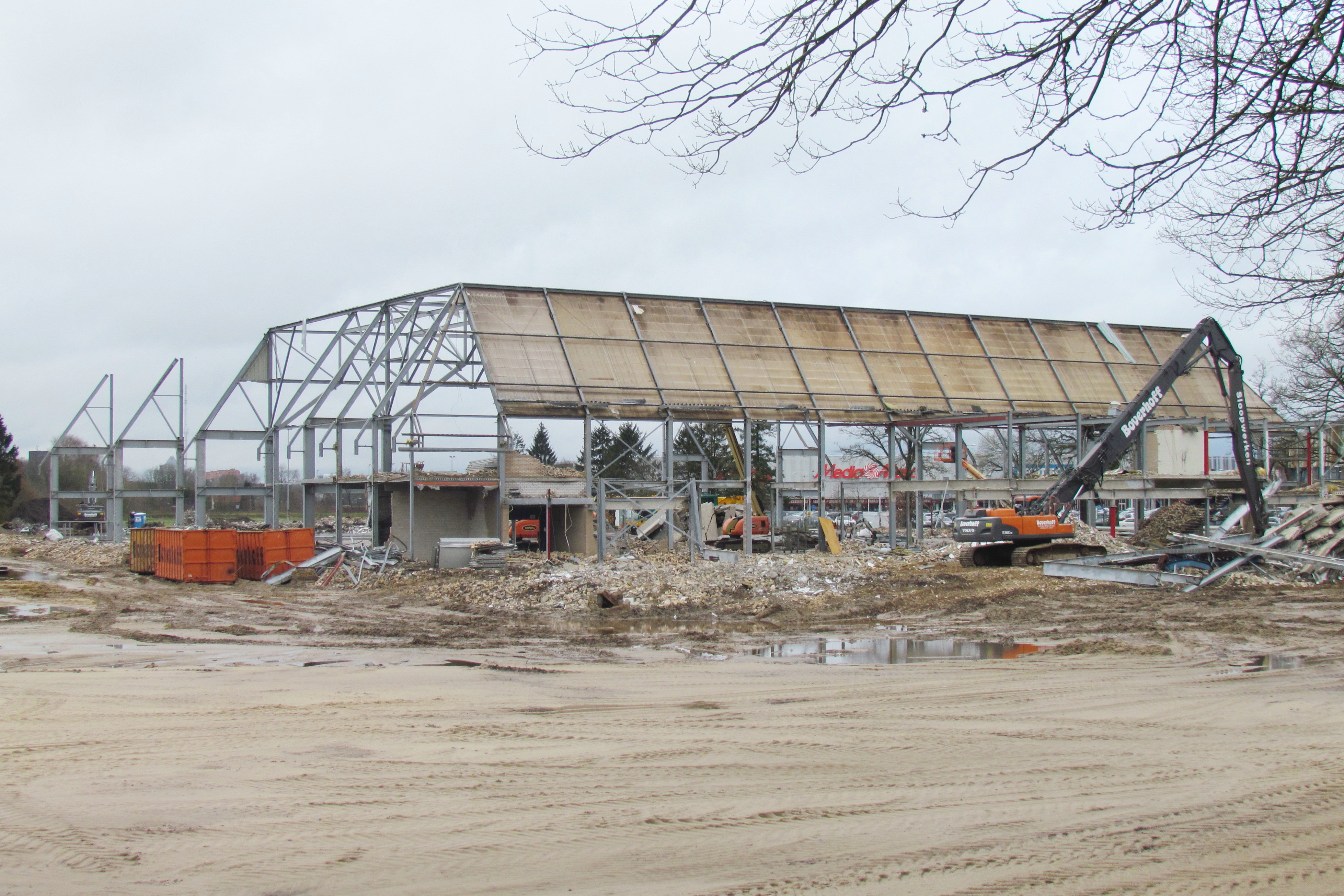 De sloop van de Americahal te Apeldoorn (NL) nadert zijn voltooiing